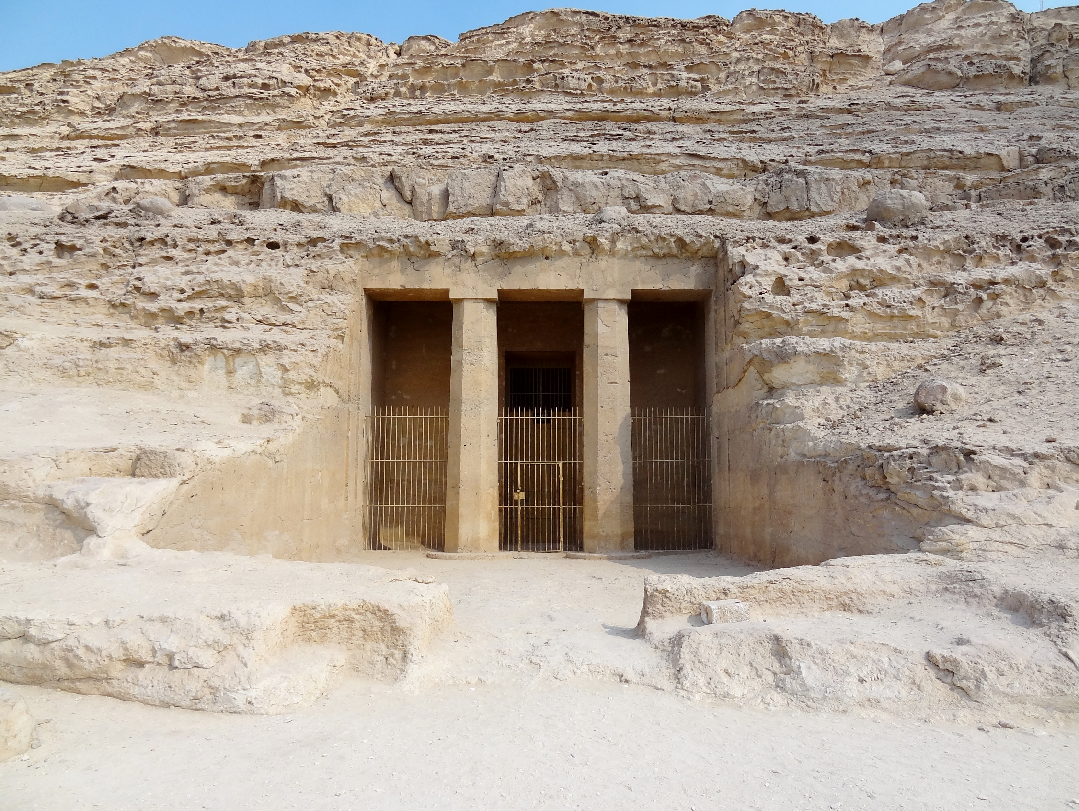 Eingang zum Grab des Amenemhet (BH 2) der Felsengräber von Beni Hassan, südlich von El Minya, Ägypten